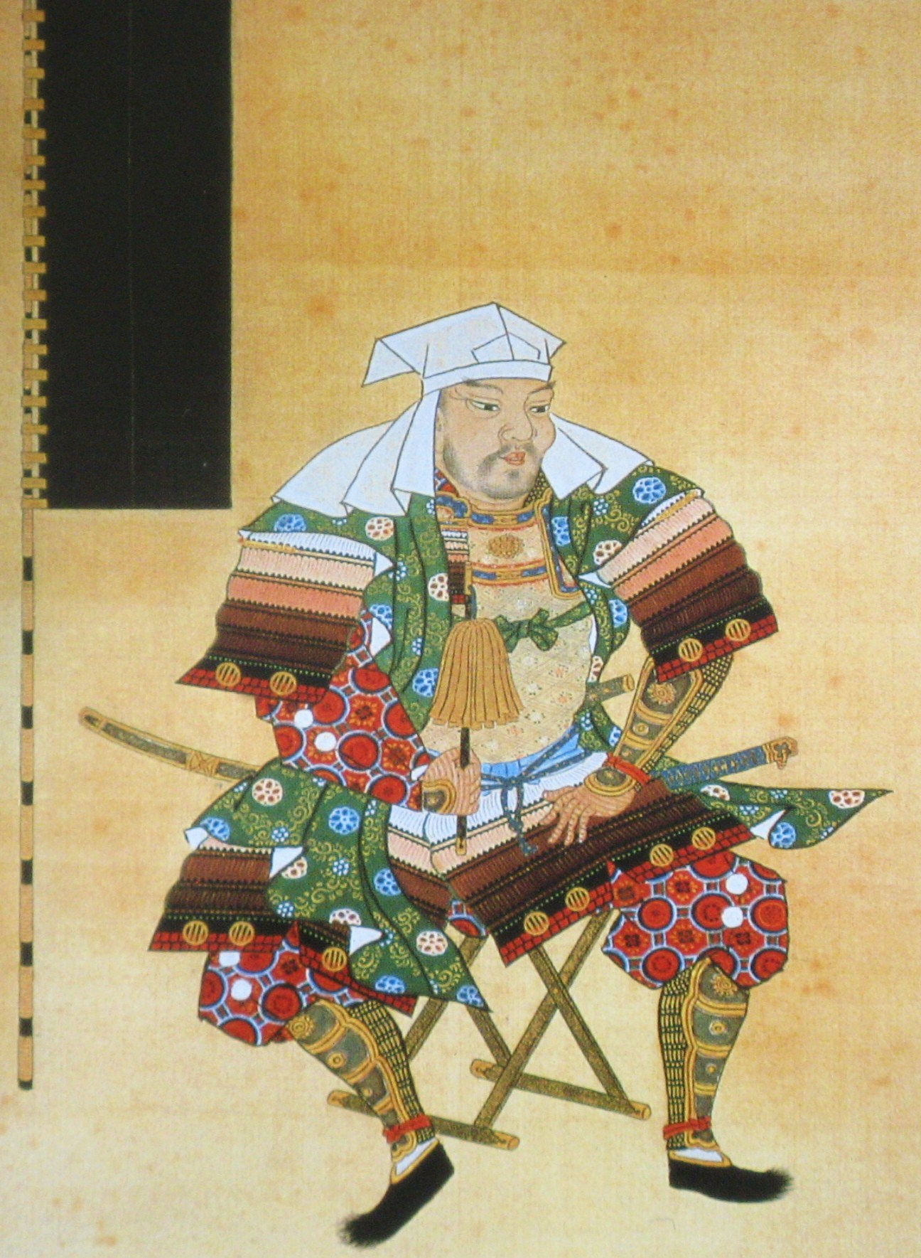 仙台市博物館所蔵の伊達輝宗肖像。